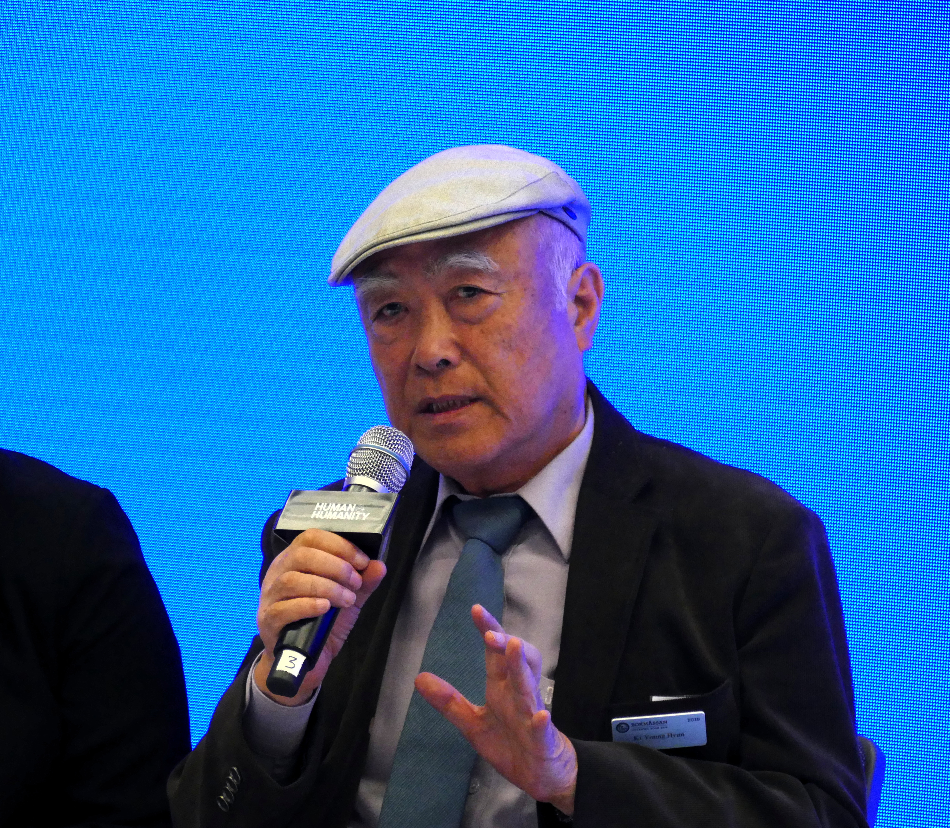 Hyun Ki-young på Bokmässan i Göteborg 2019.